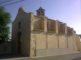 Església del Mas del Jutge